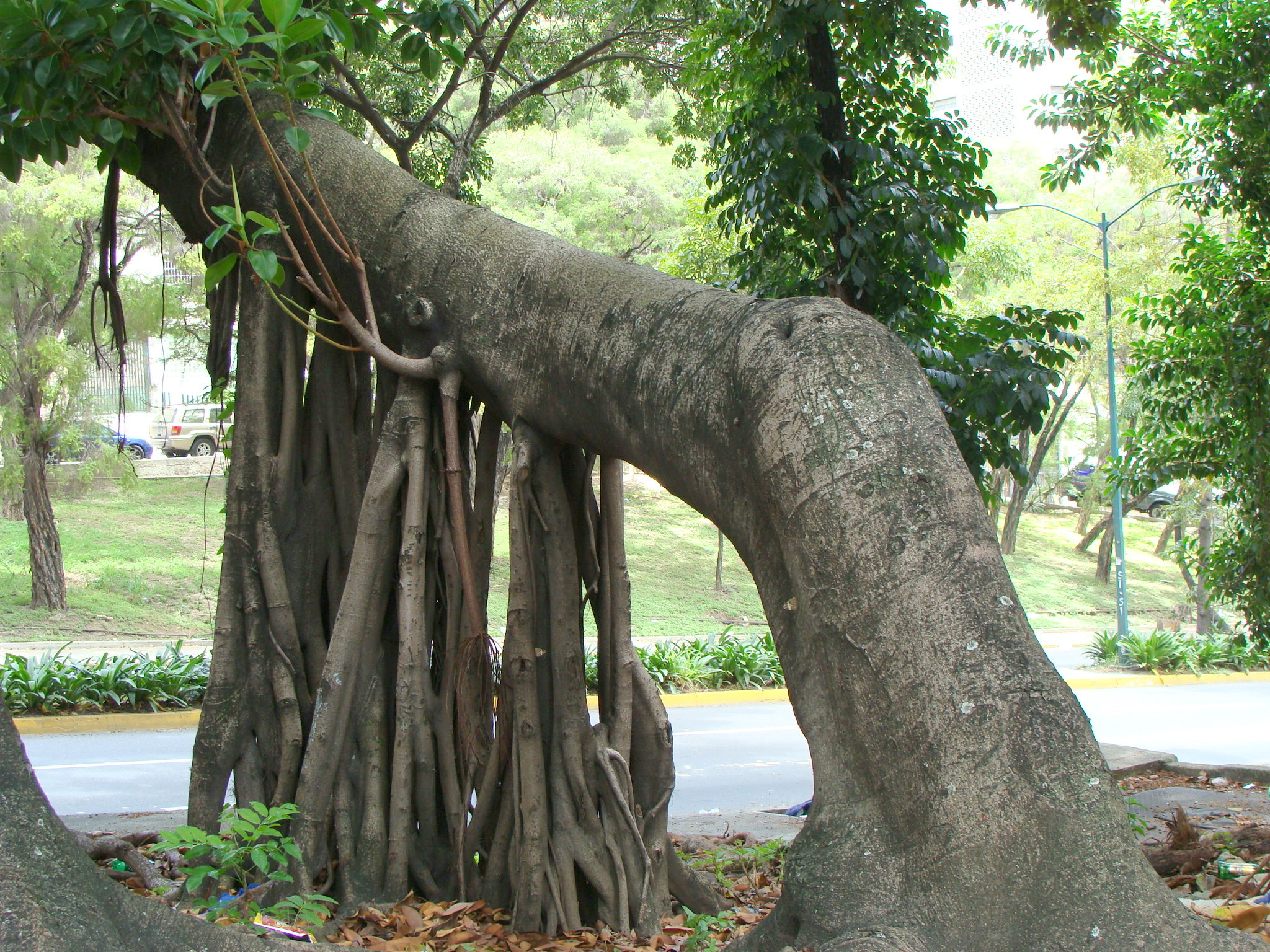 Raíces aéreas convertidas en troncos de apoyo de un baniano (Ficus benghaliensis), usadas para desplazarse desde el lugar original hacia otro con mayor insolación